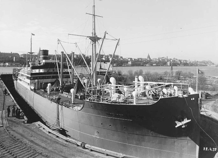 Beckholmen. Gustaf V:s docka. förmodligen tagen 1937.